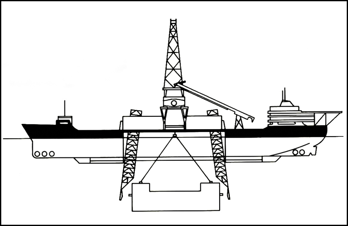 Infografía que muestra el funcionamiento del Glomar Explorer (T-AG-193)